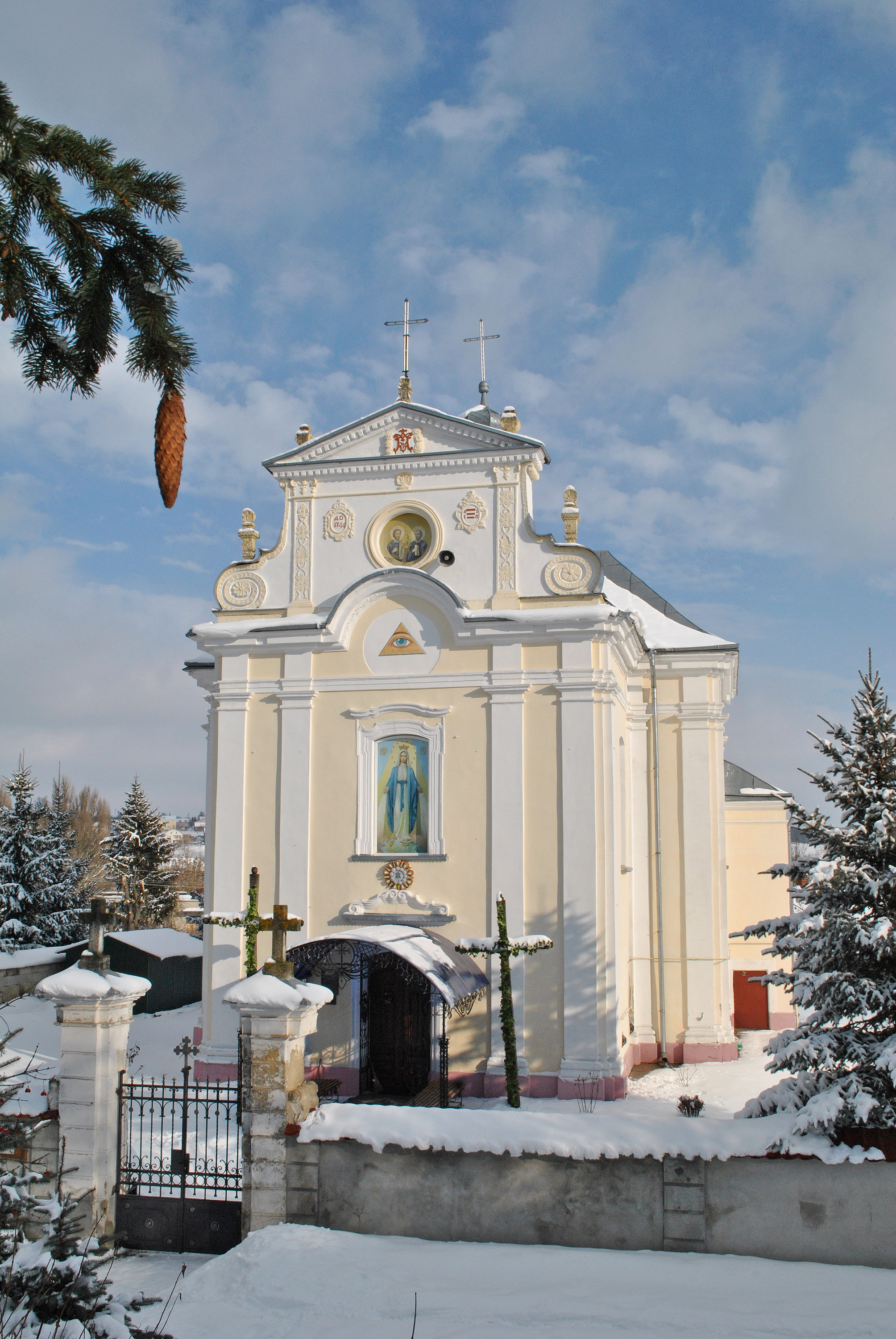 Церква Непорочного Зачаття Пречистої Діви Марії (в реєстрі пам’яток — Церква Св. Петра і Павла) Великоберезовицького деканату Тернопільсько-Зборівської архієпархії УГКЦ в селі Буцневі Тернопільського району Тернопільської области (Україна).